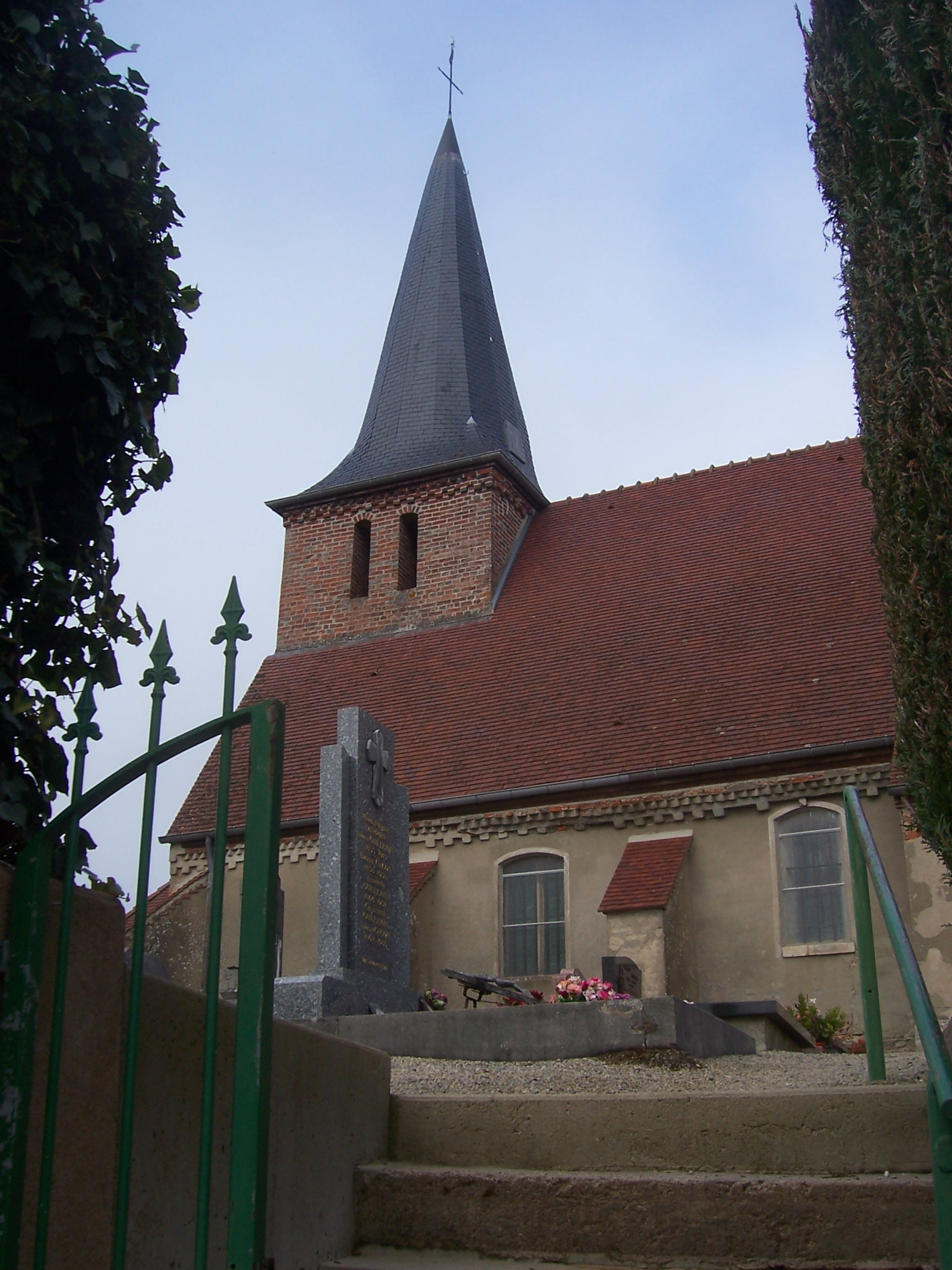 Eglise de Montagny-près-Louhans